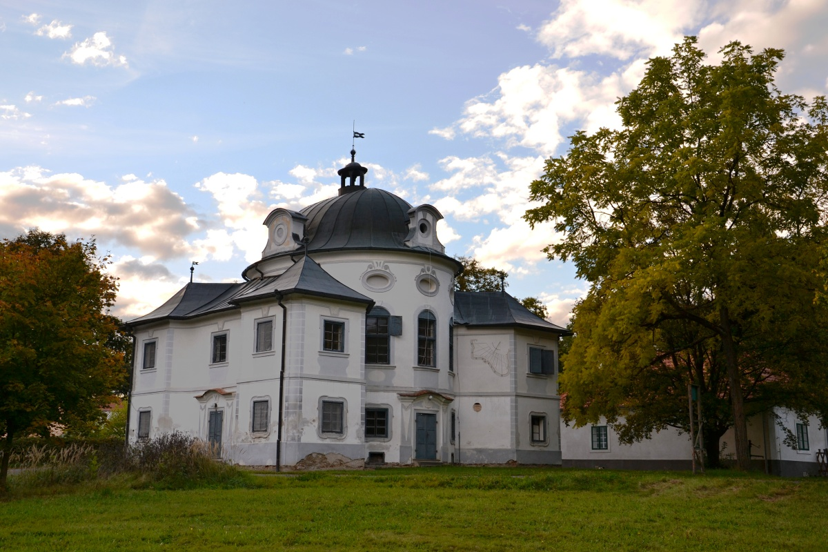 Zámek Karlov